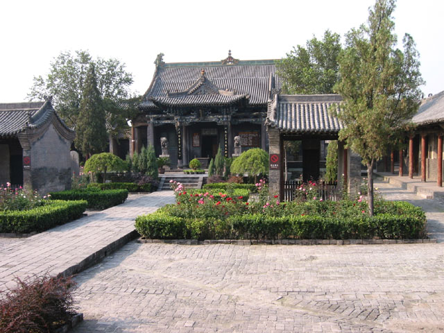 Двор даоскага храма 清虚观